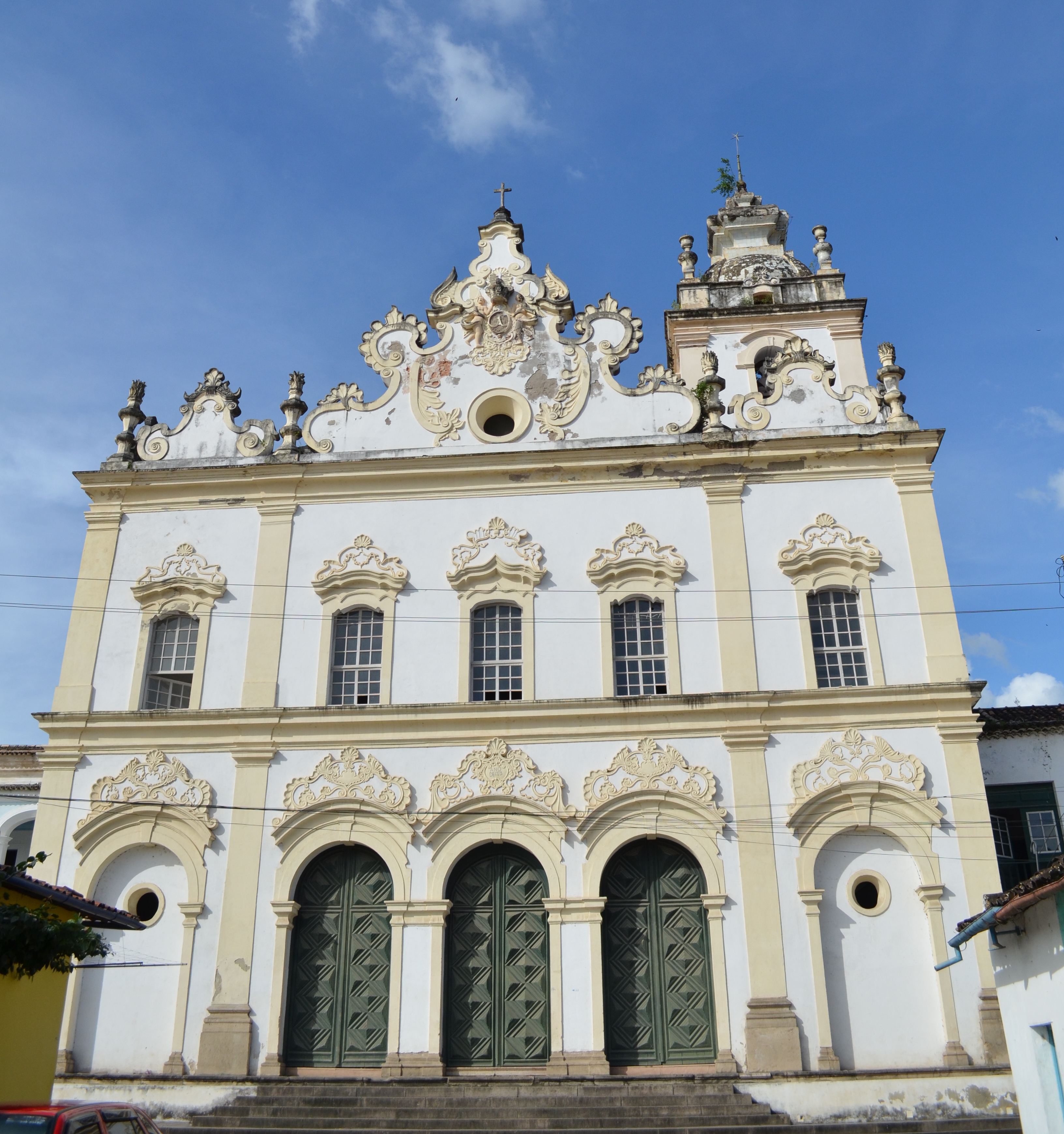 Igreja da Ordem Terceira do Carmo.